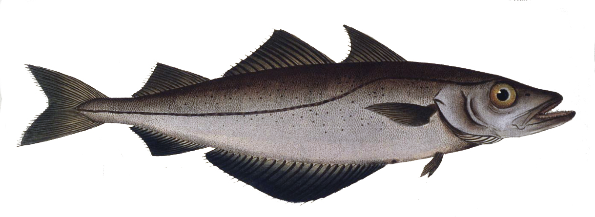 Pollachius pollachius